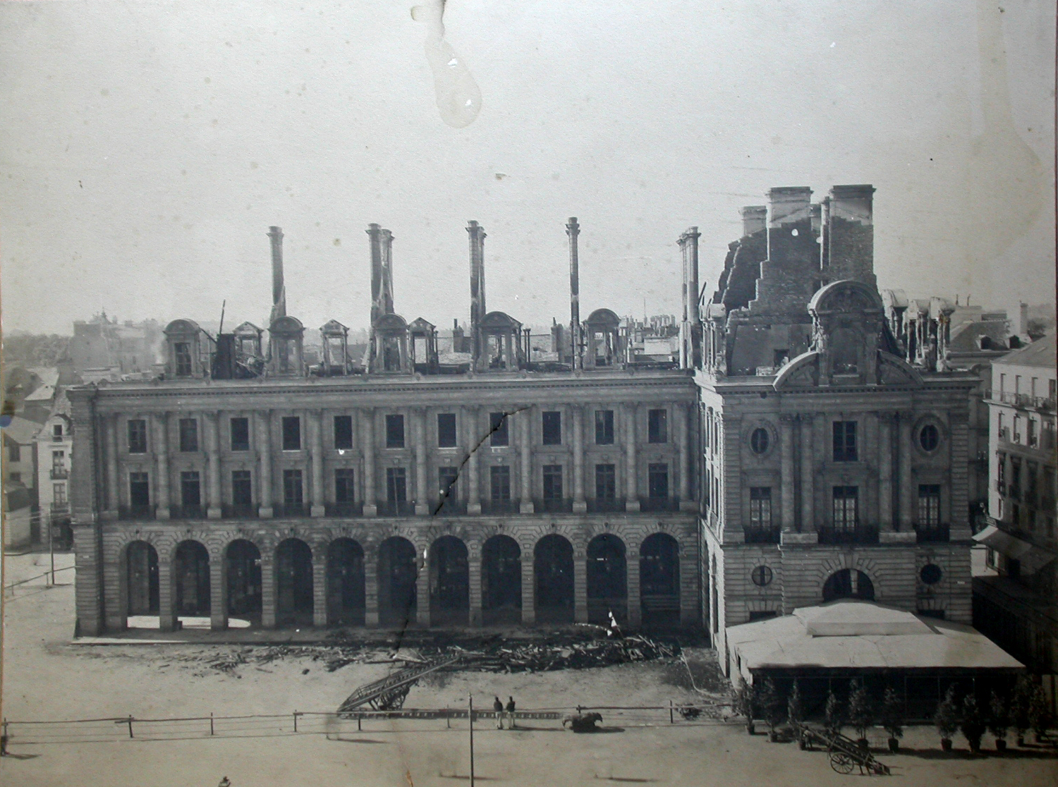 Photographie noir et blanc du Palais du Commerce de Rennes après l'incendie du 29 juillet 1911. Archives municipales de Rennes, 350 Fi 62.